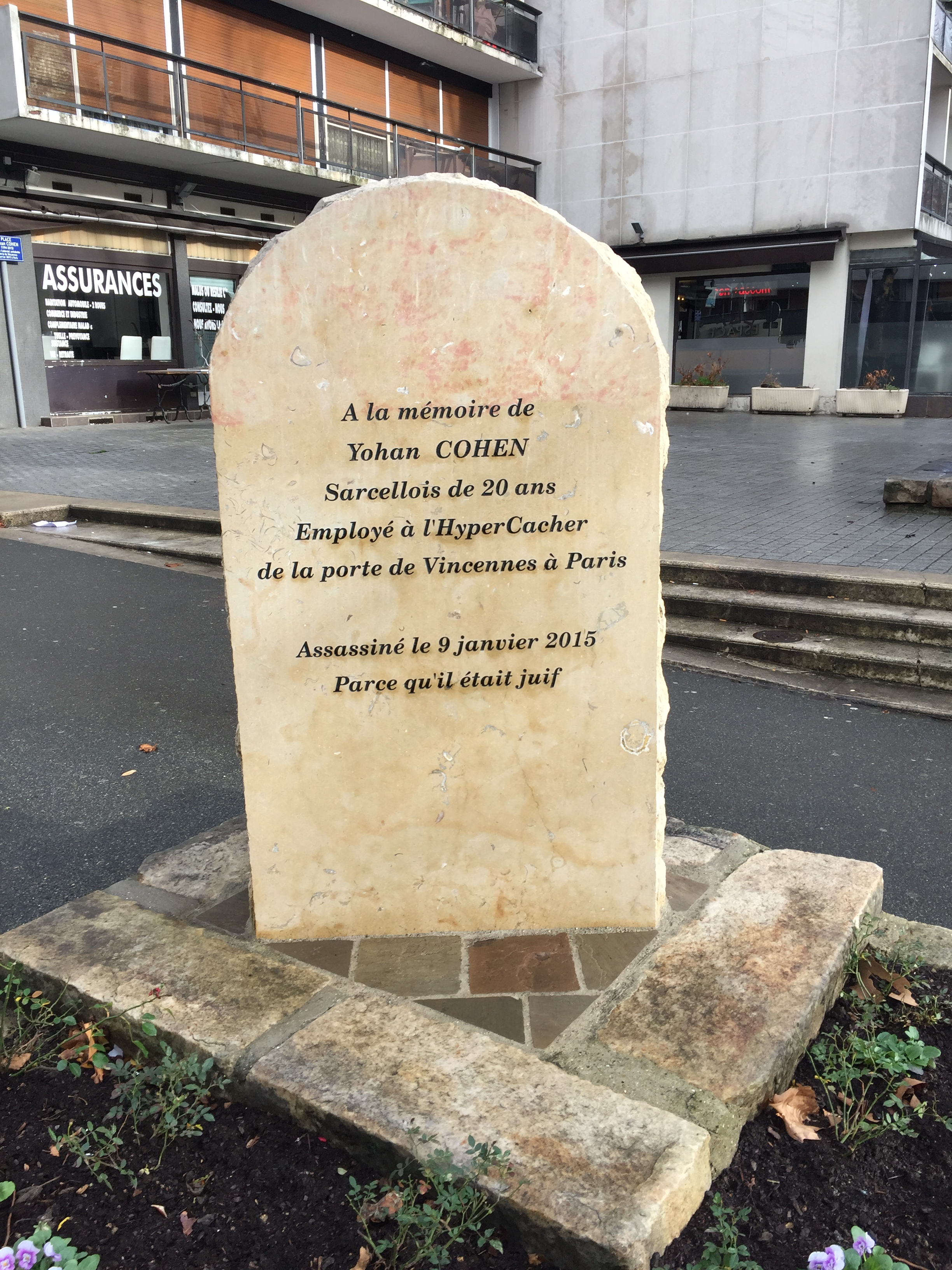 Stèle en mémoire de Yohan Cohen, victime de la prise d'otages de l'Hyper Casher de la Porte de Vincennes à Paris le 9 janvier 2015, implantée "place Yohan Cohen" à Sarcelles (Val-d'Oise), ville où il résidait.